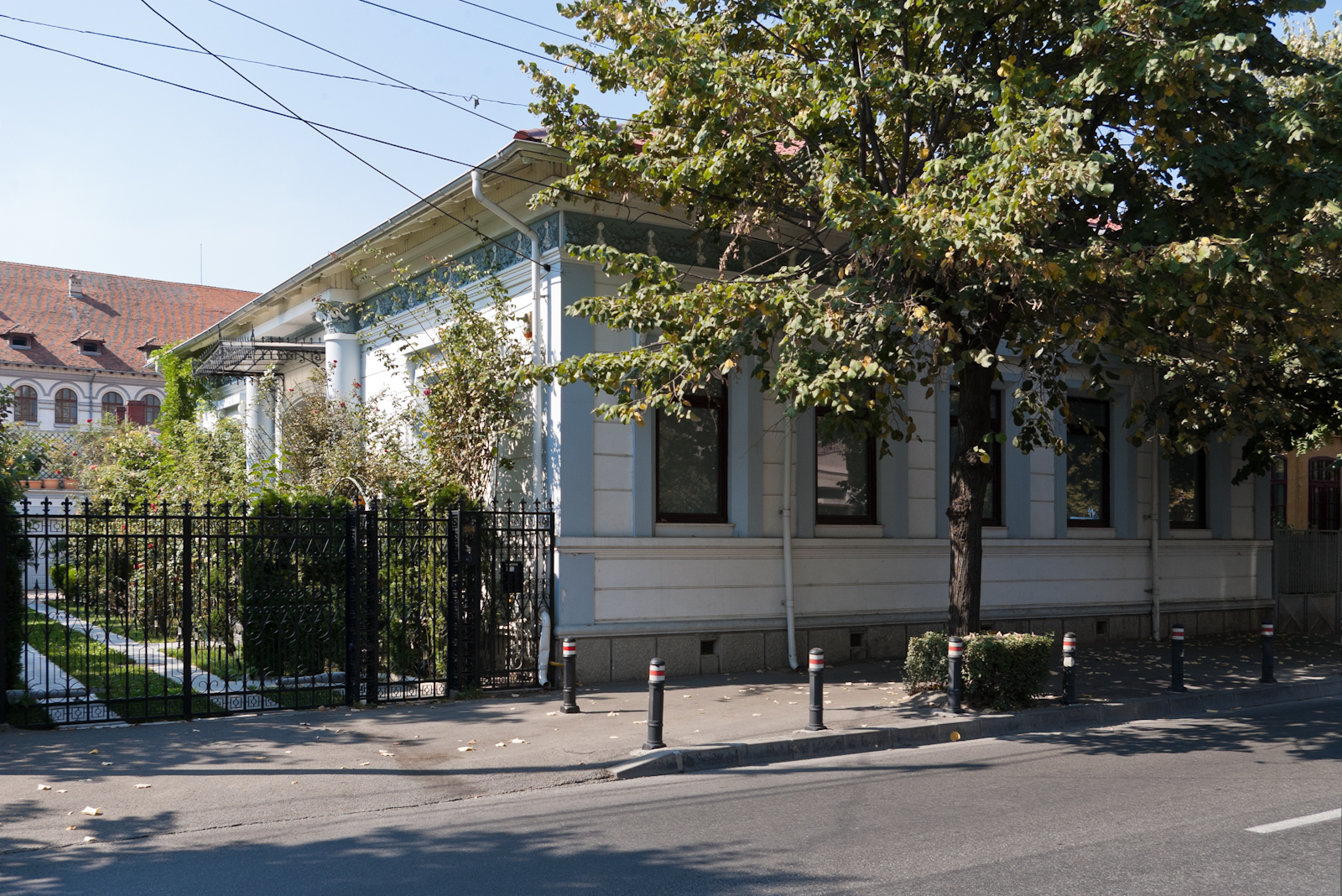 Fotografia prezinta casa Marmulea de pe bd. Republicii 104.